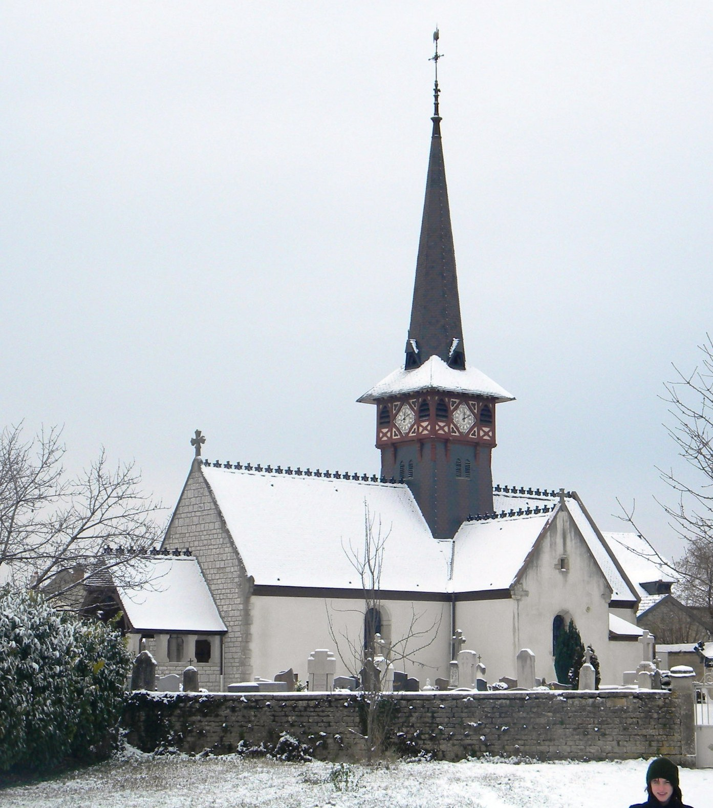 Pregxejo de Vignoles, Côte-d'Or, France